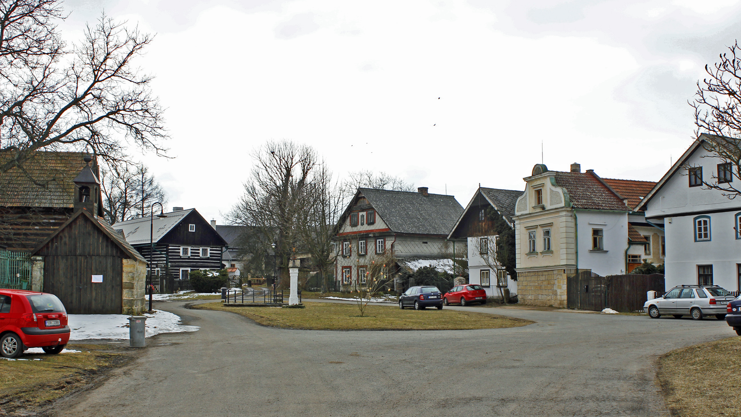 Náves ve Vísce, části Březovic na Mladoboleslavsku.